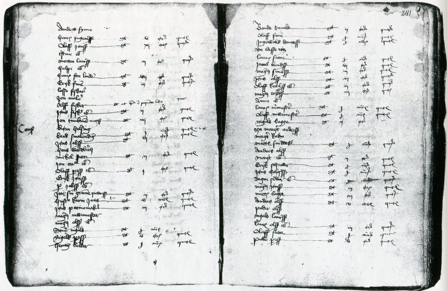 Stockholms stads skottebok med uppslag från 1463